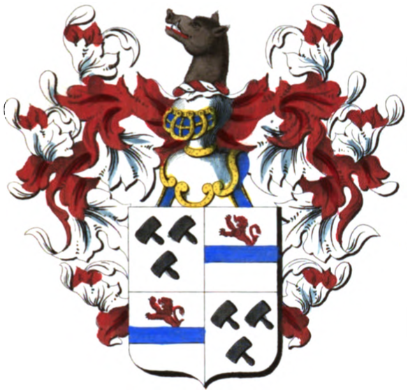 Armoiries de la famille de Woelmont